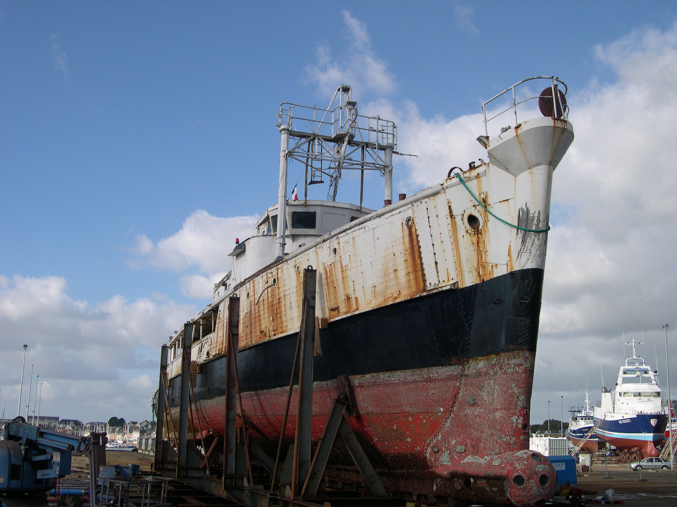 Calypso sur le terre-plein des chantiers navals de Concarneau.